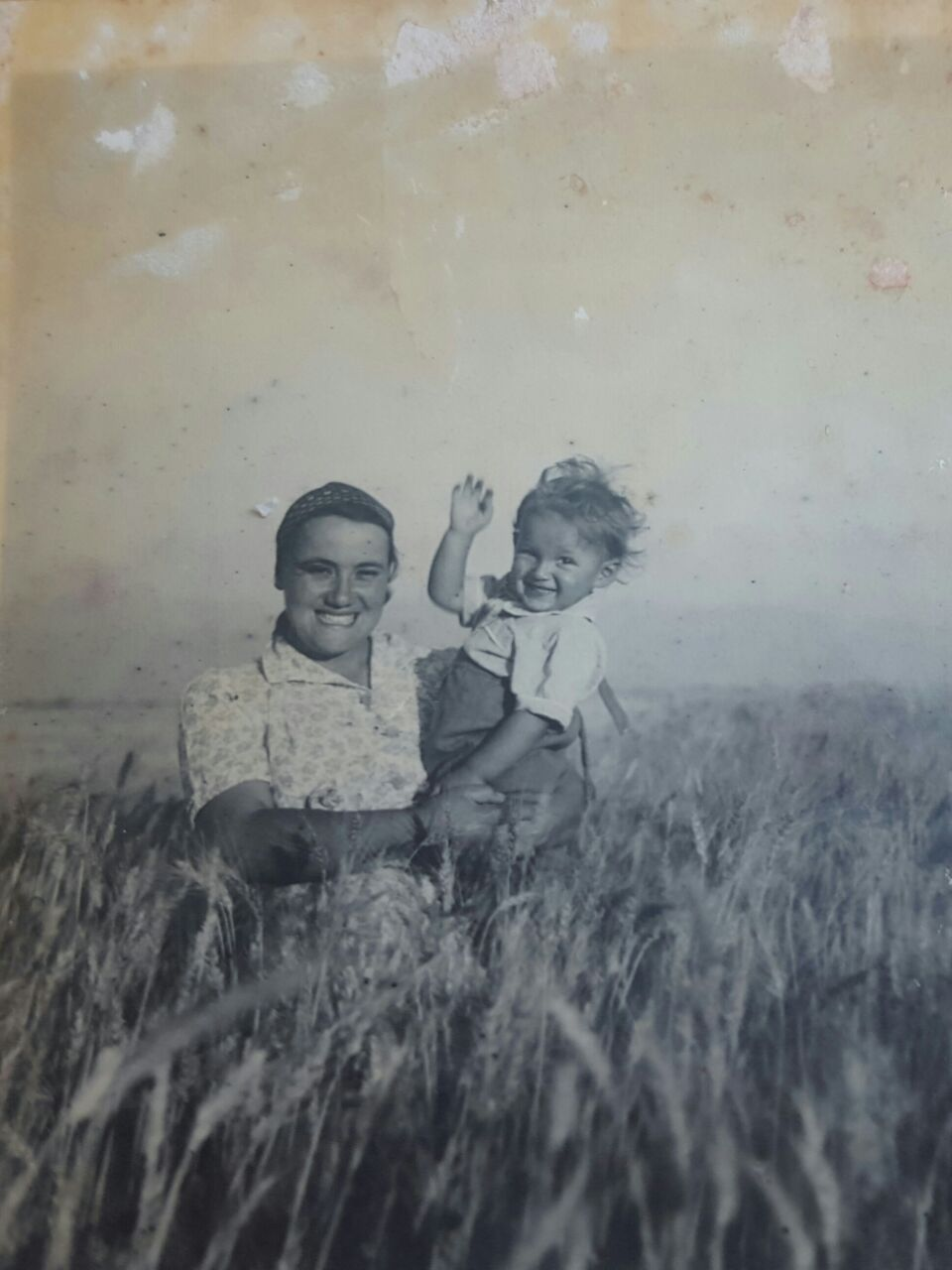 מטילדה עם יורם בקיבוץ שדה אליהו ב-1948